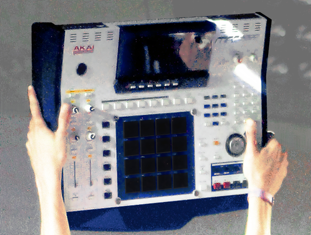 Akai MPC4000, Norbergfestival 2009